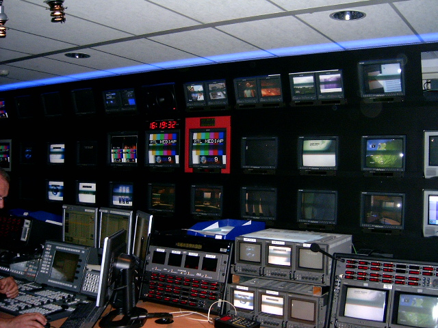 Regie Studio 9(Nieuws studio van RTL Nederland)